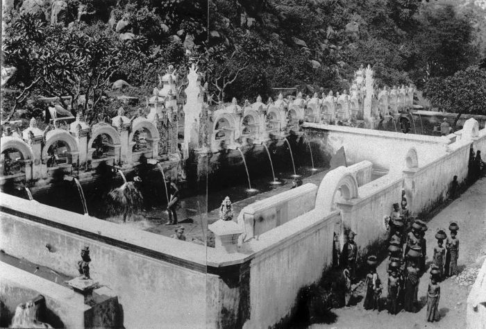 Foto. Waterplaats Tedjakoela, Bali.